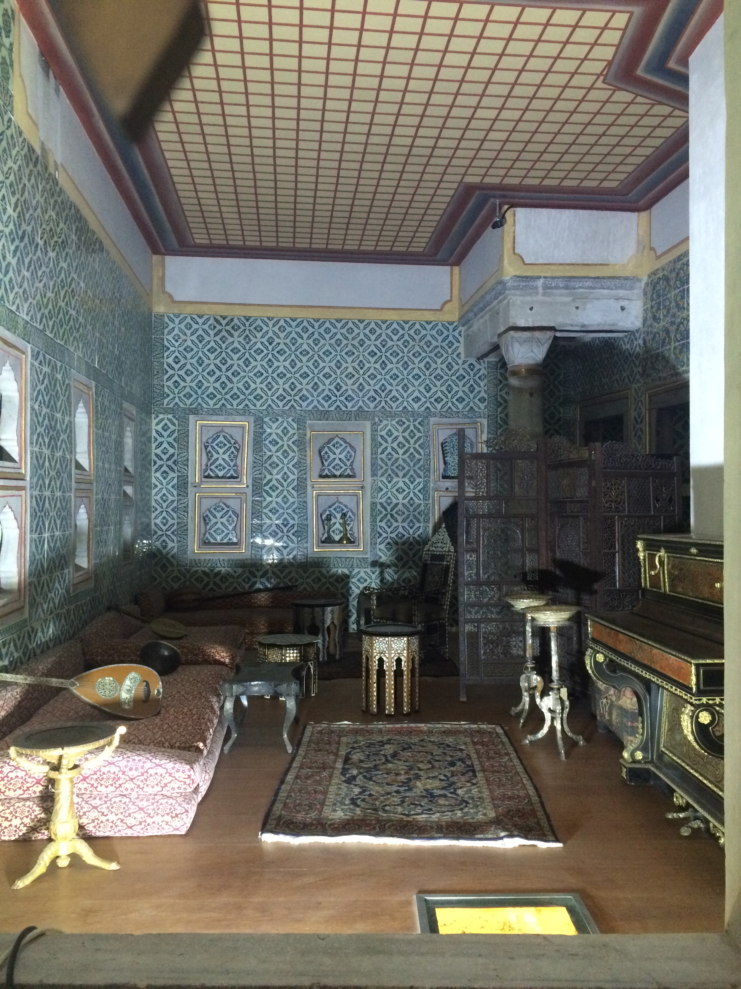 A palota belsőbb részeiben található eunuch lakrész